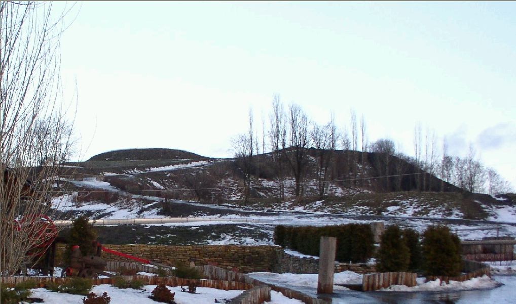 Łódź - Ruda Pabianicka - Rudzka Góra - Fragment Rudzkiej Góry od zachodu Autor: 2003, Marek Szuszkiewicz